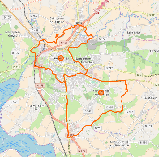 projet de commune nouvelle d'Avranches